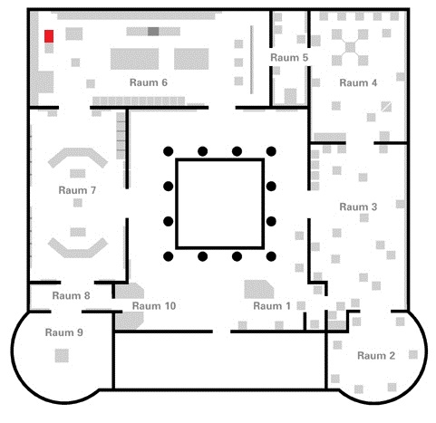 Grundriss der Dauerausstellung des Landesmuseum für Vorgeschichte Halle (Sachsen-Anhalt) mit Exponaten vom Paläolithikum bis in die Frühbronzezeit Markierung der Ausstellung Benzingerode Totenhütte